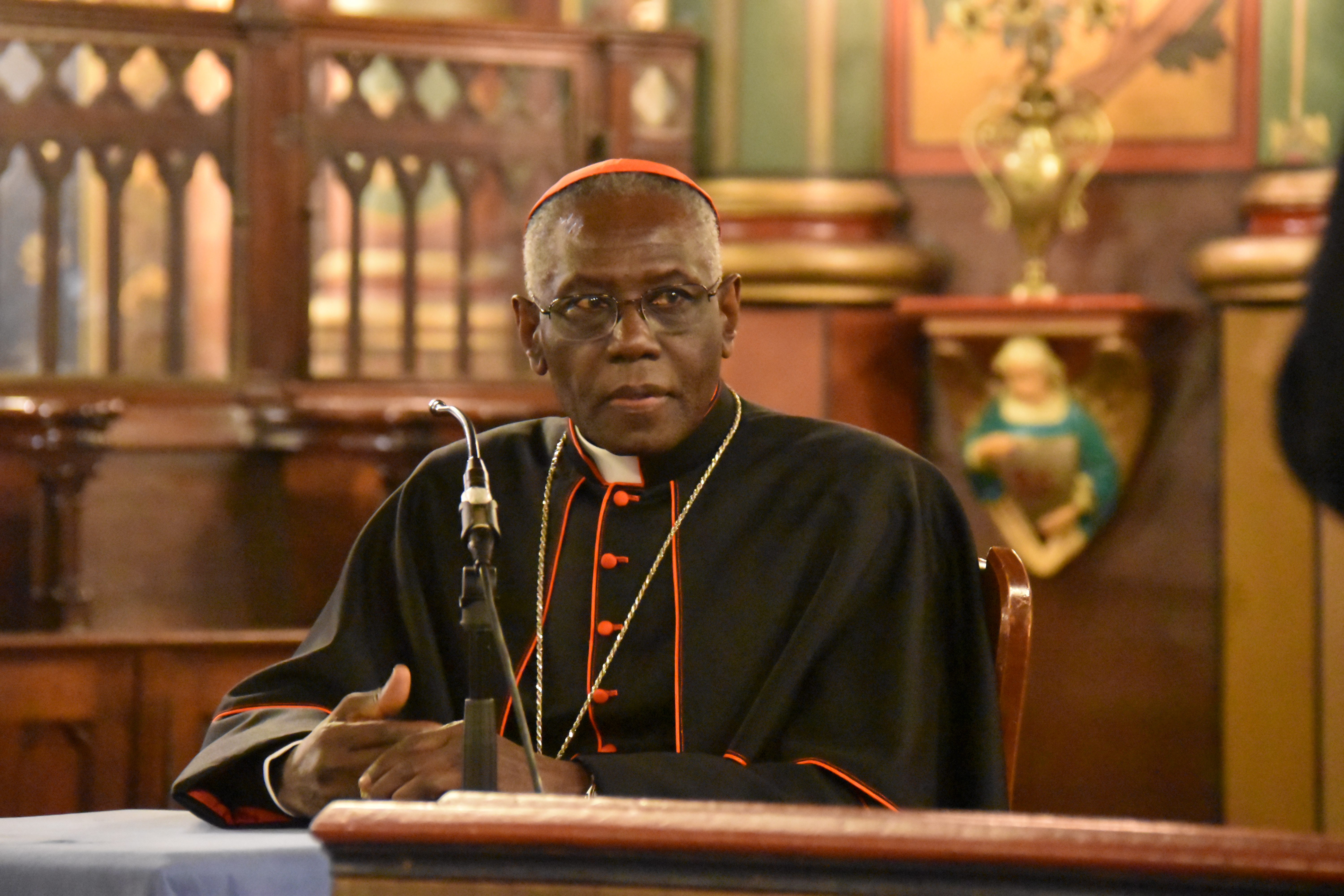 Le Cardinal Robert Sarah